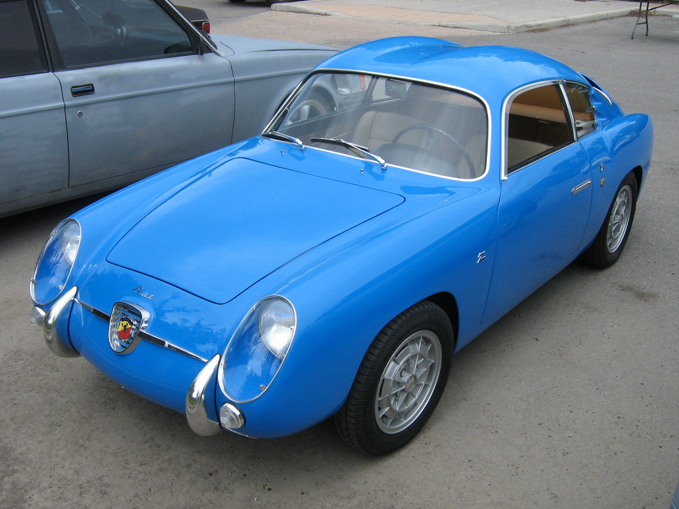 1959 Fiat Abarth 750 GT Zagato